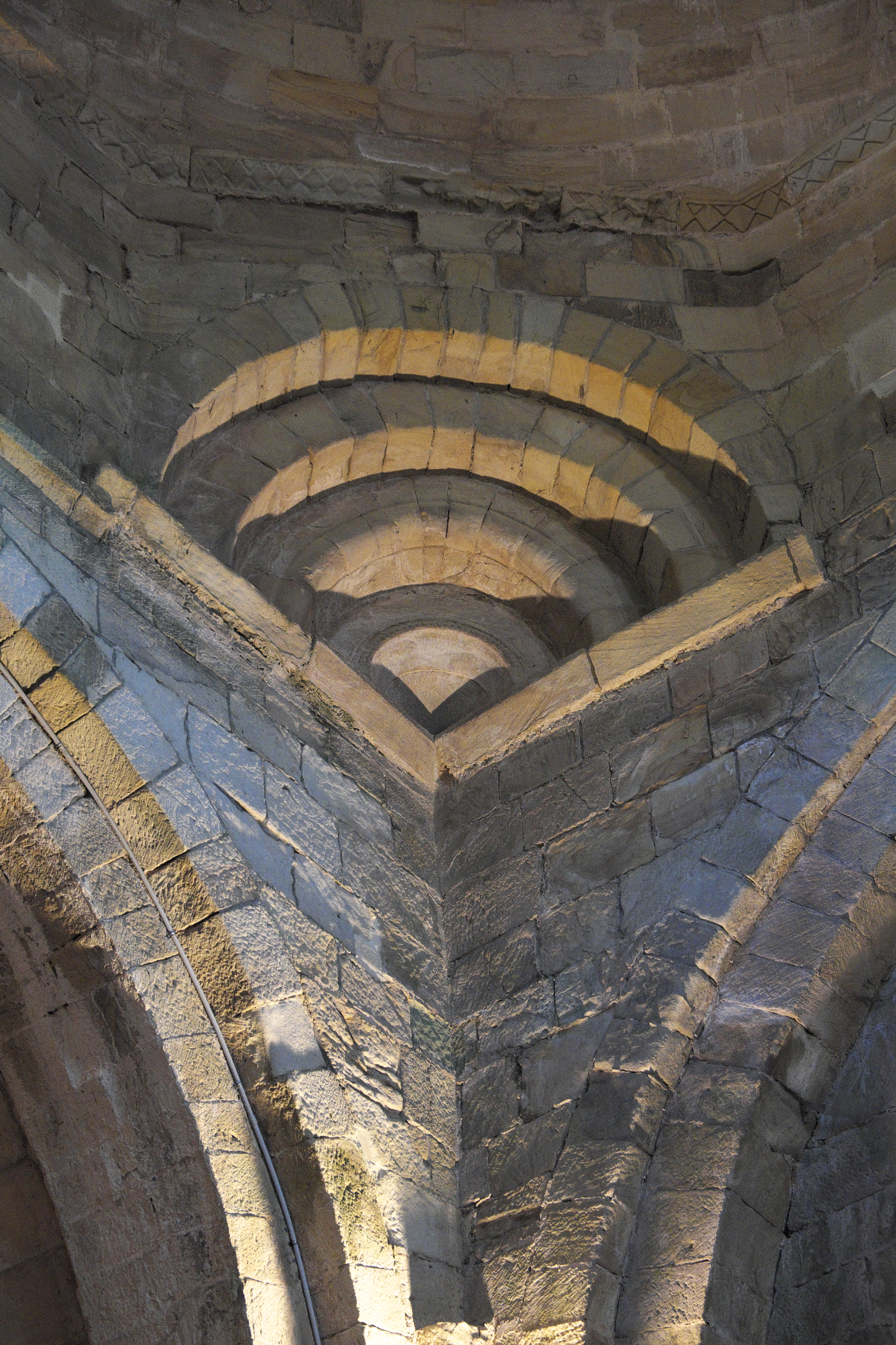 Ehemalige Benediktinerklosterkirche Colegiata de Santa Cruz in Castañeda in Kantabrien (Spanien), Kuppel über Trompen mit Rundbögen